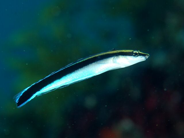 ニセクロスジギンポ Aspidontus taeniatus taeniatus